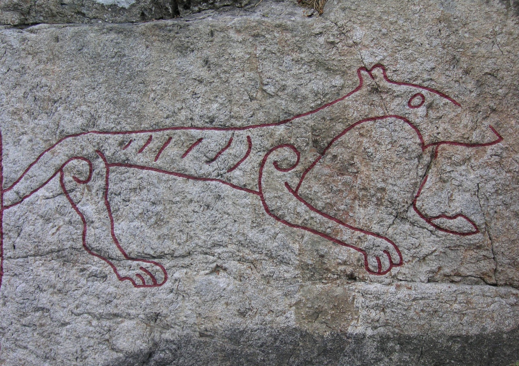 Södermanlands runinskrifter 311-313 är en runinskription i omedelbar anslutning till Holmfastvägen i Södertälje i Sörmland, detalj från Sö 313.